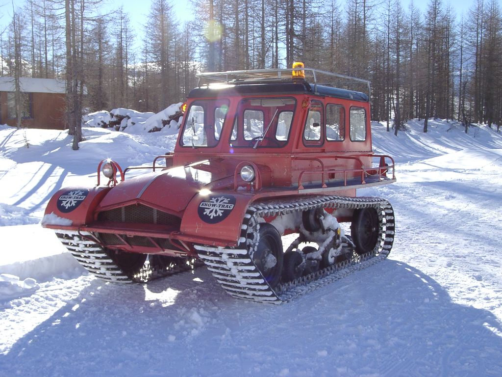 Snow-Trac Kettenfahrzeug Außenansicht Hersteller: AB Westeråsmaskiner (Schweden)